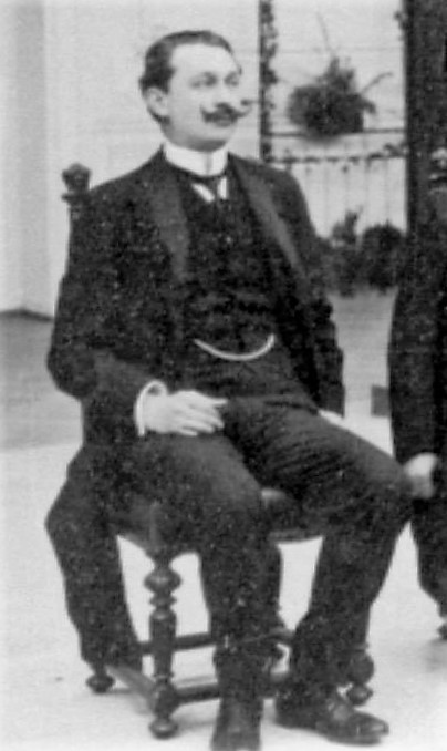 Carlos Larraín Claro, nació en Santiago, el 27 de agosto de 1871 y falleció en la misma ciudad el 22 de enero de 1927. , fue un abogado, destacado funcionario de Correos de Chile, diputado, ministro y director de empresas chileno. Esta fotografía esta tomada en 1910, como ministro de guerra y marina bajo la presidencia de Emiliano Figueroa Larraín.